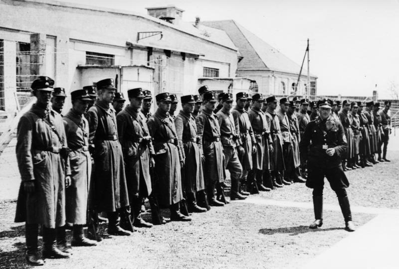 Dachau, Konzentrationslager Schutzhaftlager Dachau.- SS-Wachablösung.